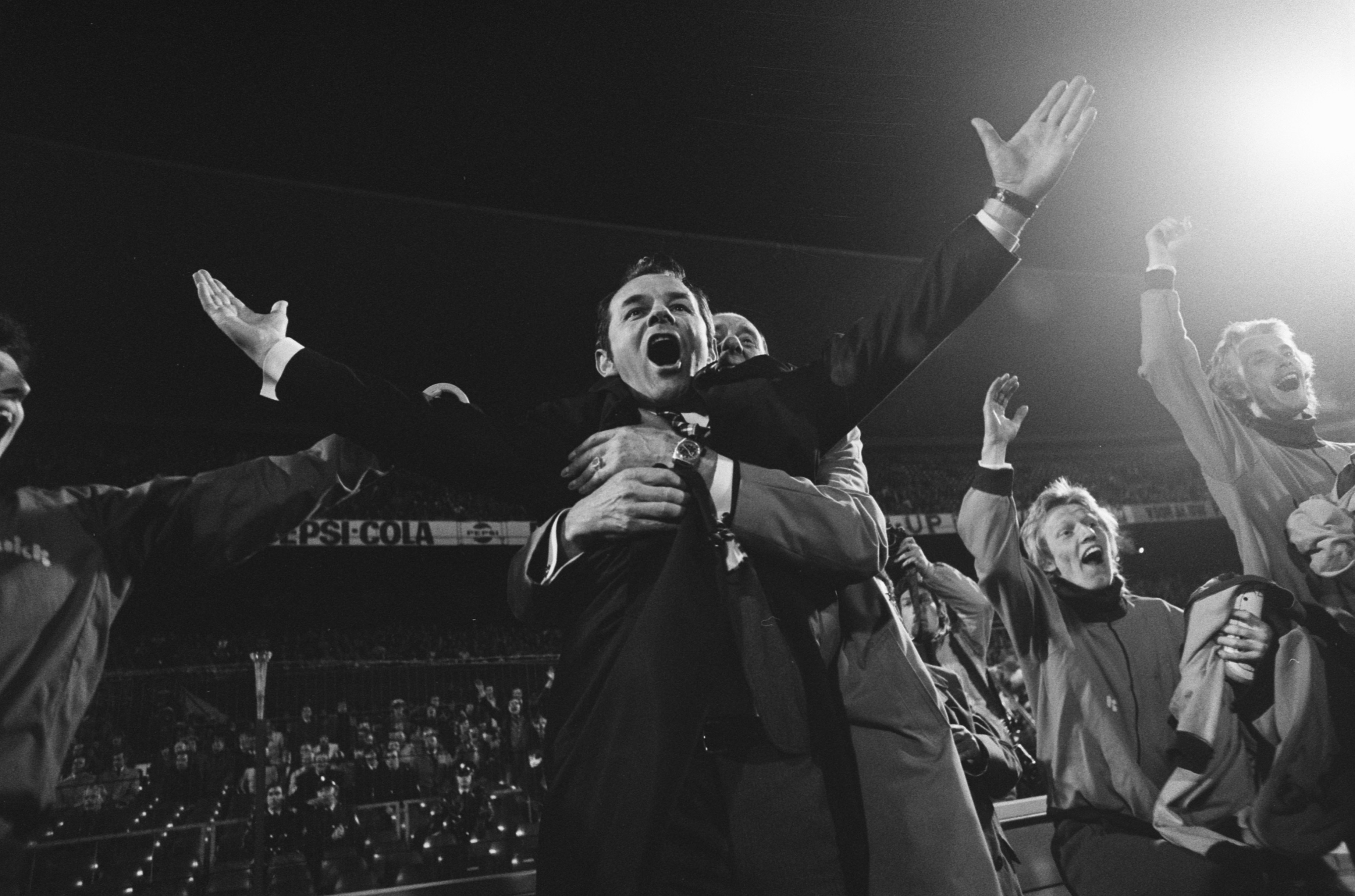 Finale de coupe KNVB de football FC Den Haag - FC Twente (1-0). Photographie de l'entraîneur Vujadin Boškov (FC Den Haag) en liesse par R. Mieremet / Anefo.